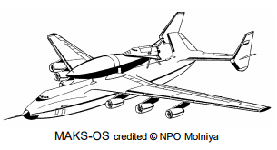 raffigurazione di una configurazione "Captive on top"